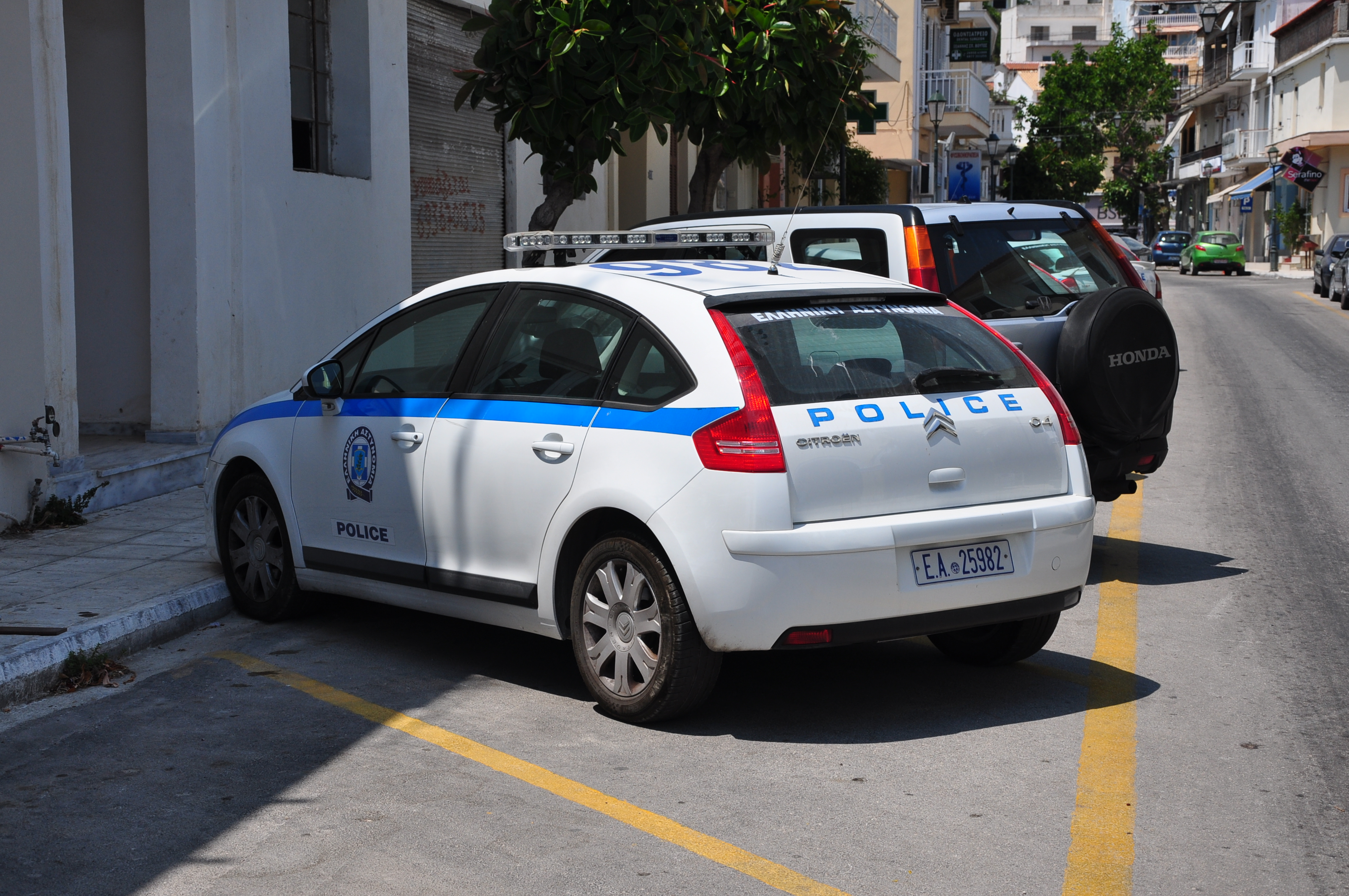 Zakynthos. Policyjny Citroen C4.